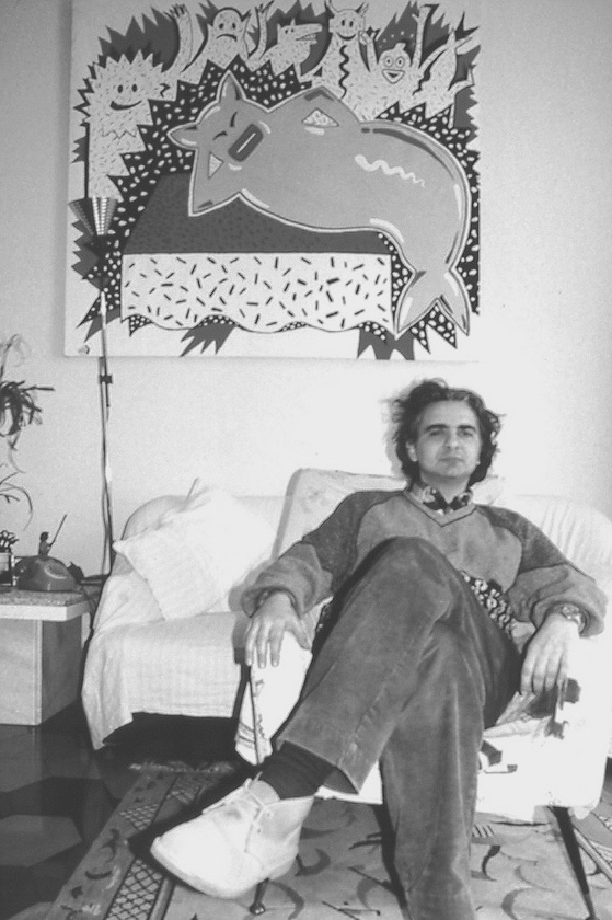 Matteo Guarnaccia, disegnatore underground italiano